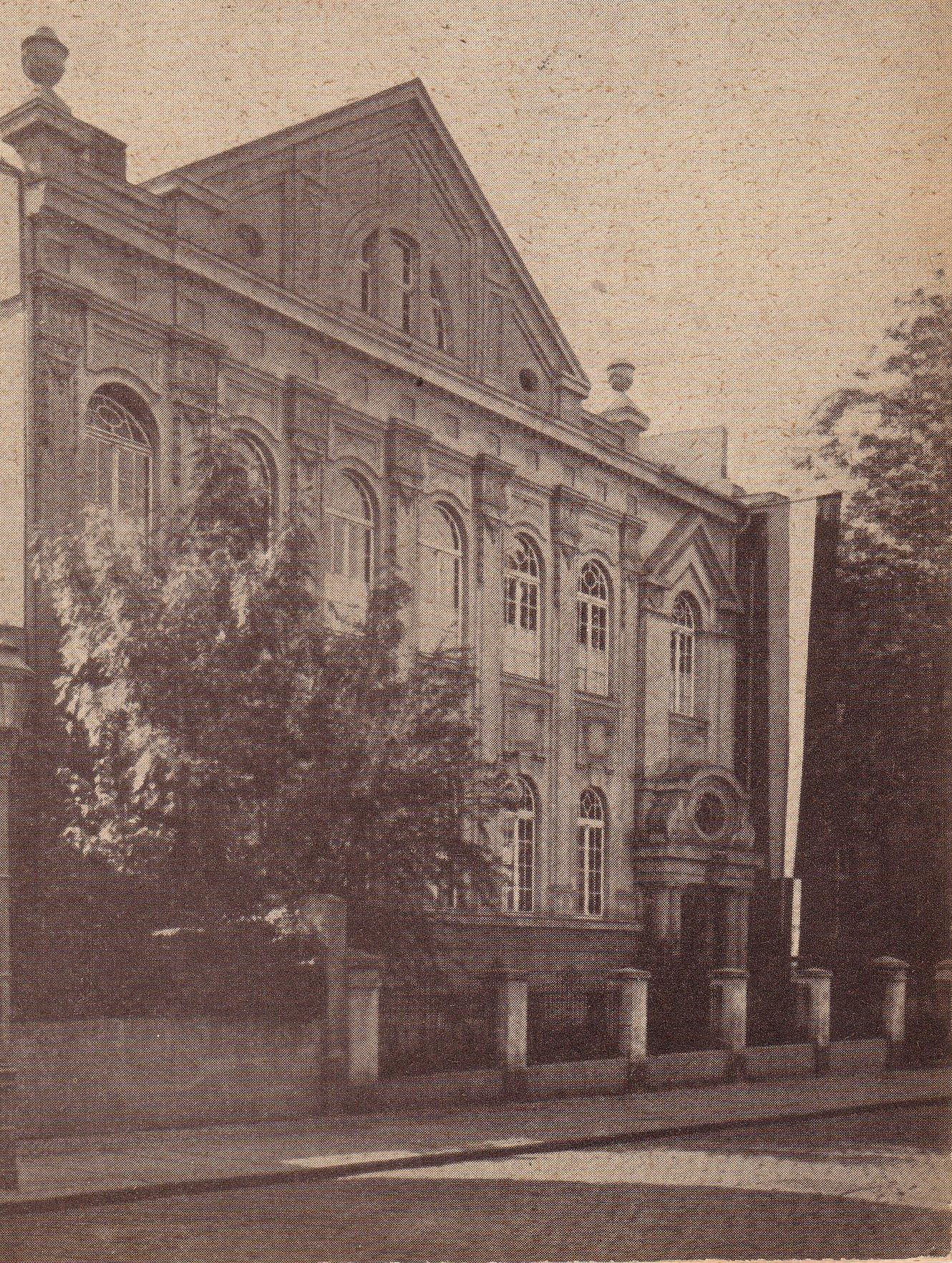 Fotografie des Corpshauses von Palaiomarchia in Halle (Saale), ehemalige Karlstraße, heute: Heinrich- und Thomas-Mann-Straße 28